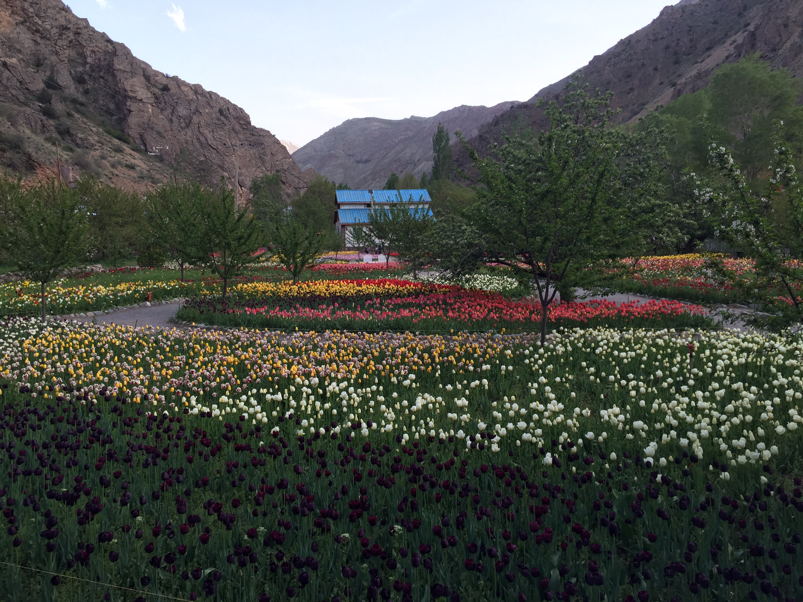 این باغ واقع در استان البرز کیلومتر 54 جاده کرج به چالوس واقع شده است که در ایام اردیبهشت دایر است